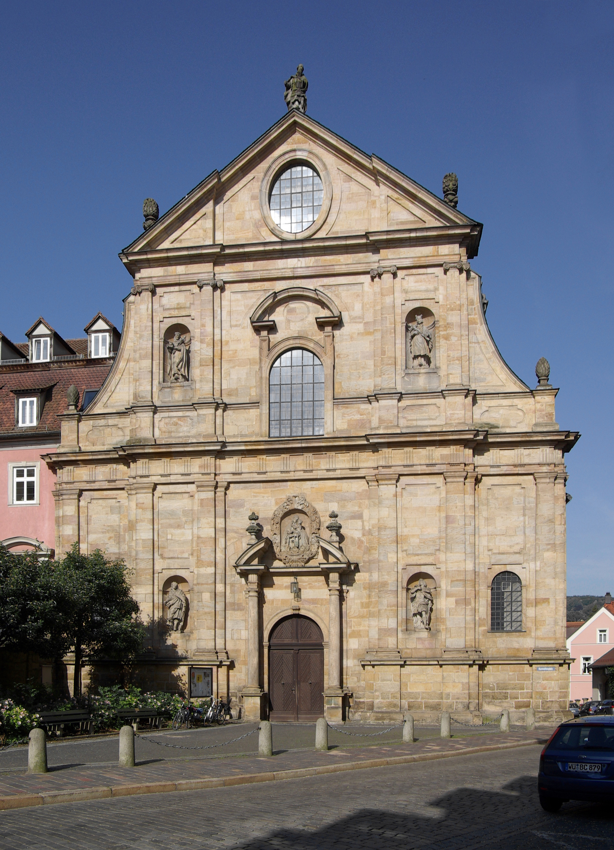 Bamberg, Kirche St. Theodor